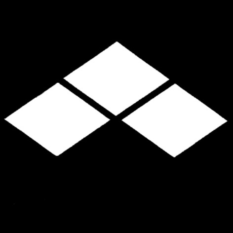 Crest of Ishihashi Daimyo, Japan